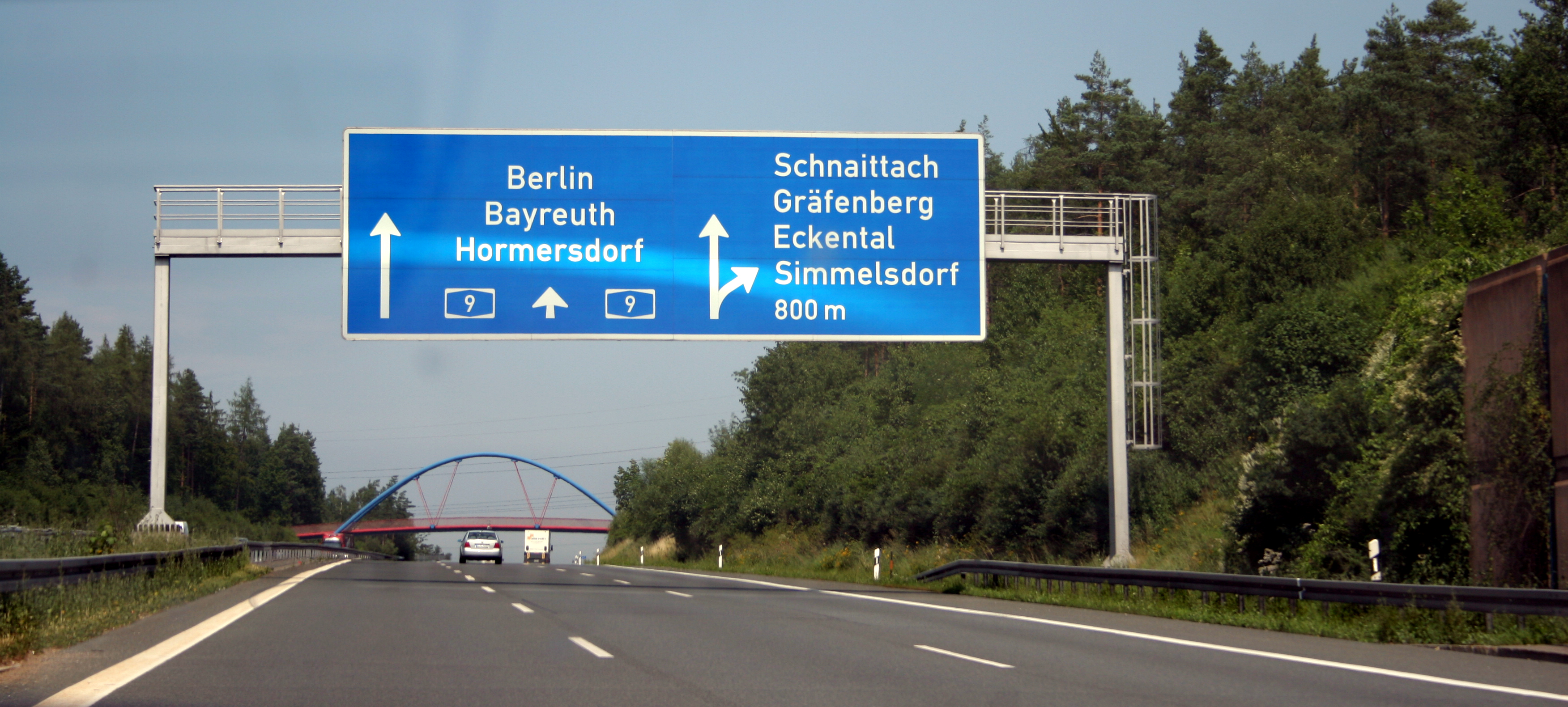 Ausfahrt 48, Autobahn A9 in Bayern, Germany.